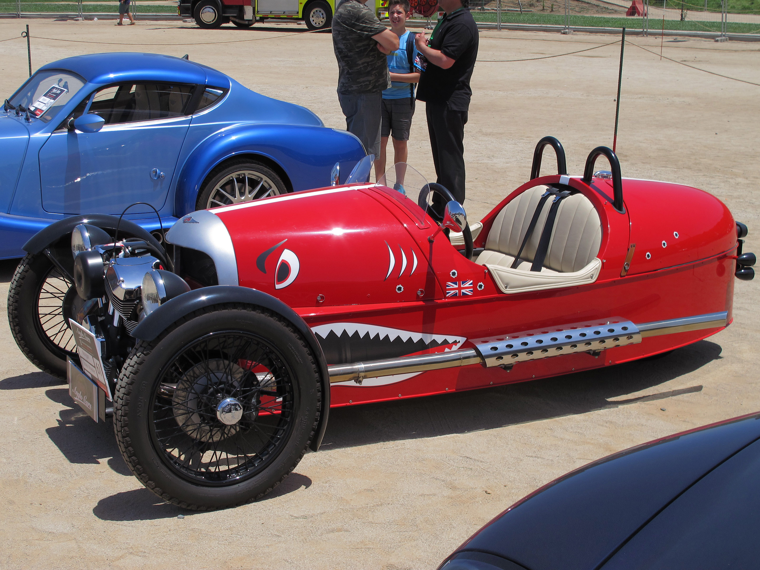 Morgan 3 Wheeler 2014